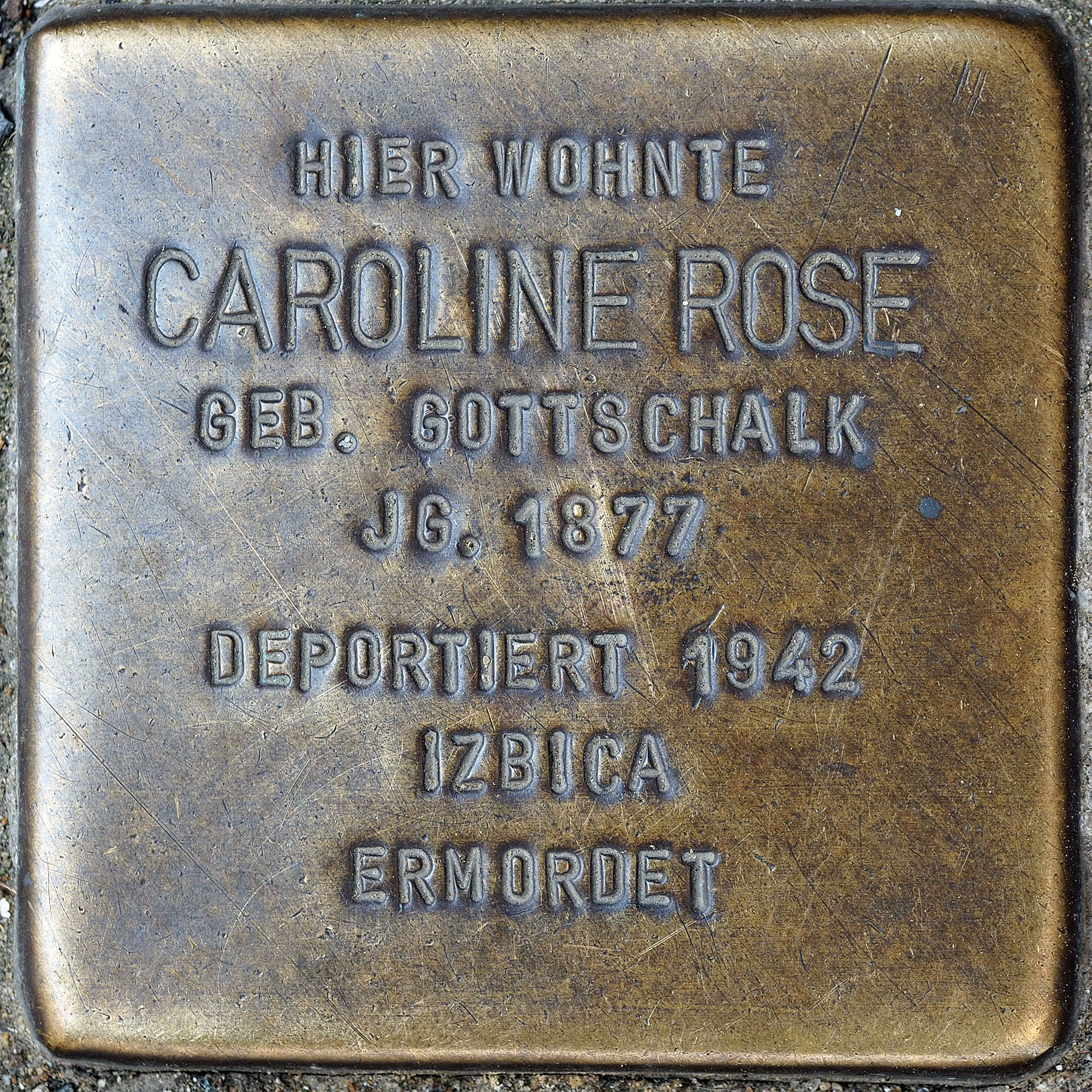 Stolpersteine MG: Rose, Caroline